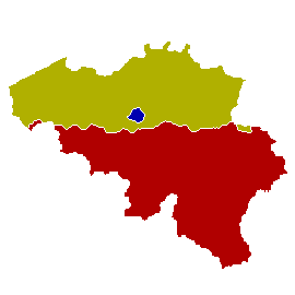 kaart Belgische gewesten (zelf gemaakt)